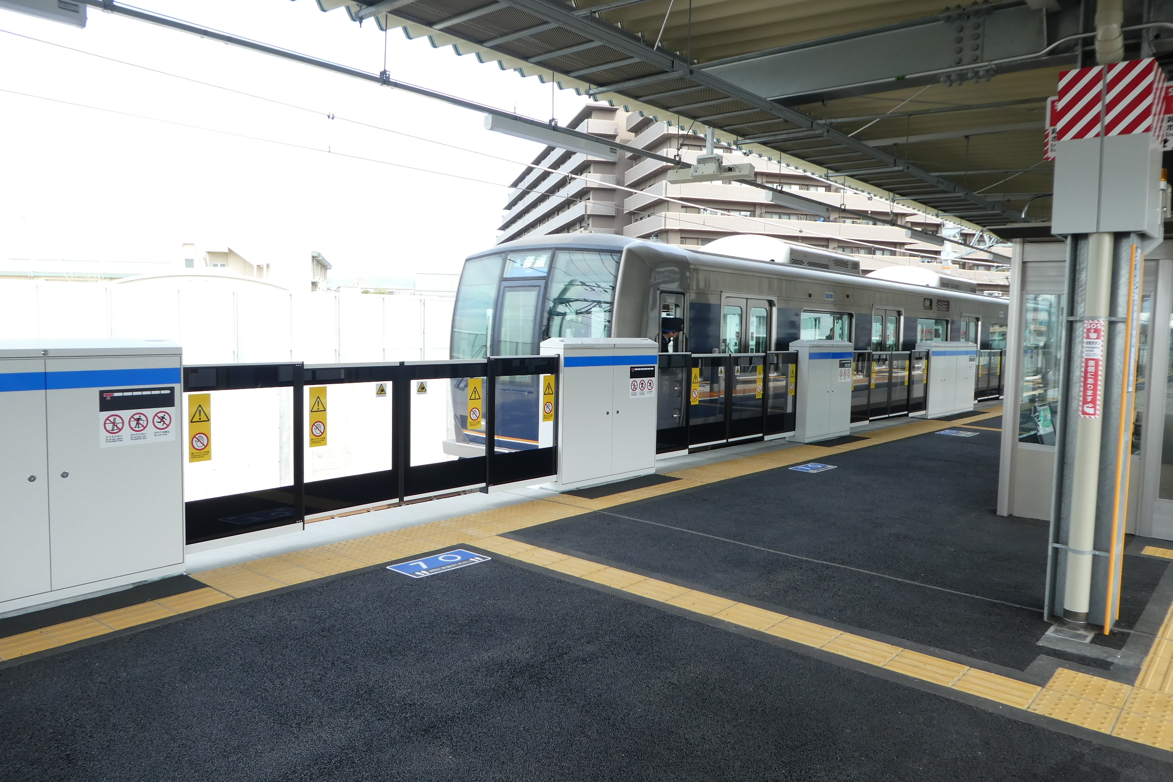 東海道本線（JR京都線）JR総持寺駅のプラットホーム。